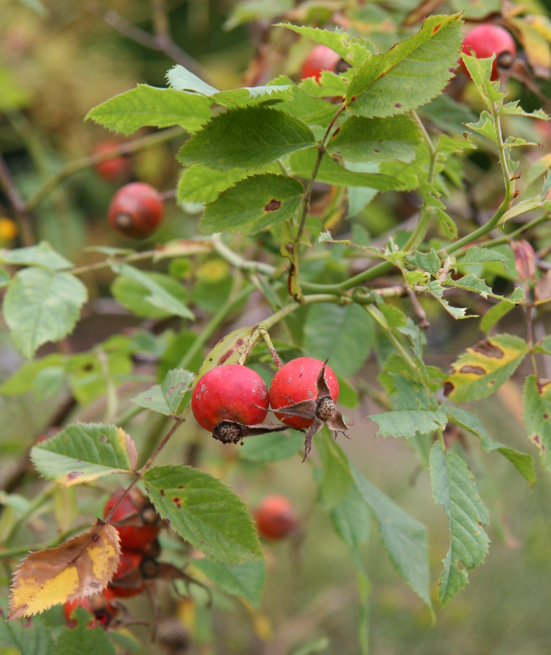 Rosa jundzillii im Botanischen Garten Dresden